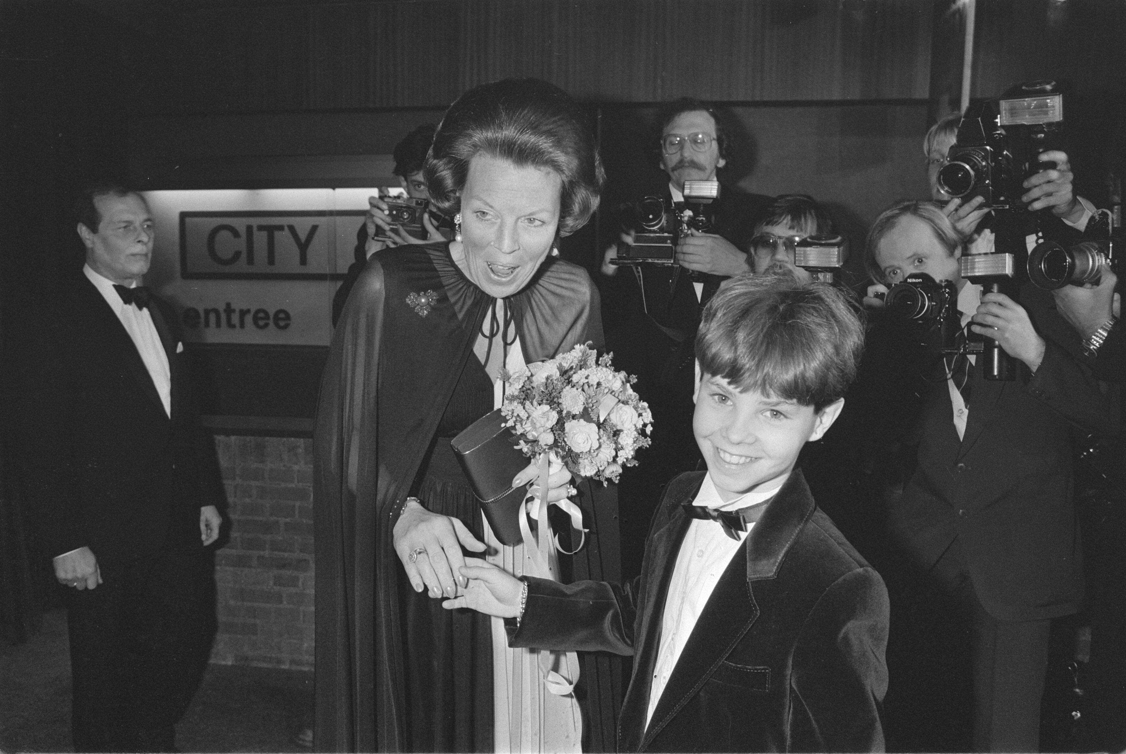 Collectie / Archief : Fotocollectie Anefo Reportage / Serie : Koningin Beatrix en Prins Claus bij premiere film "Ciske de Rat" Beschrijving : Koningin Beatrix kreeg bloemen van hoofdrolspeler Danny de Munk (Ciske) Datum : 27 maart 1984 Trefwoorden : bloemen, films, koninginnen, premieres Persoonsnaam : Beatrix, koningin, Claus, prins, Munk, Danny de Fotograaf : Croes, Rob C. / Anefo Auteursrechthebbende : Nationaal Archief Materiaalsoort : Negatief (zwart/wit) Nummer archiefinventaris : bekijk toegang 2.24.01.05 Bestanddeelnummer : 932-9142